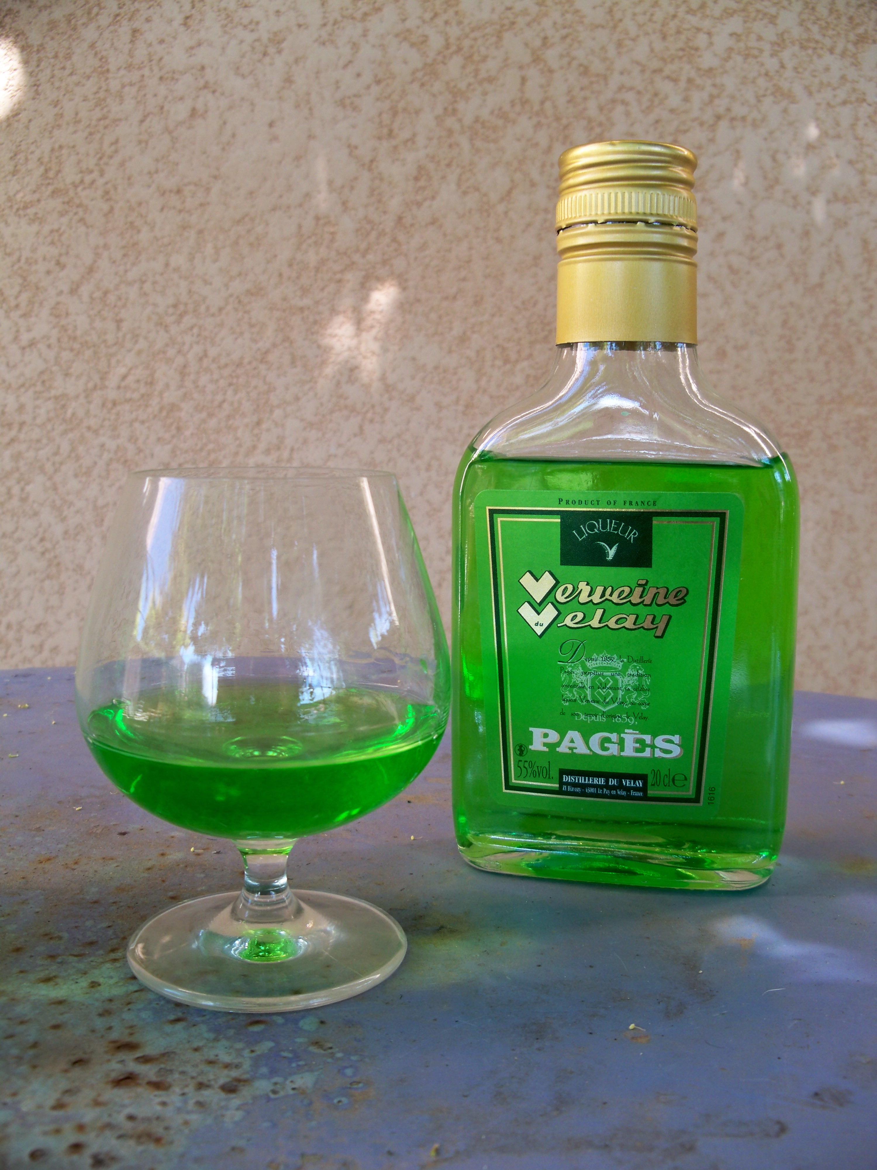 bouteille de Verveine du Velay